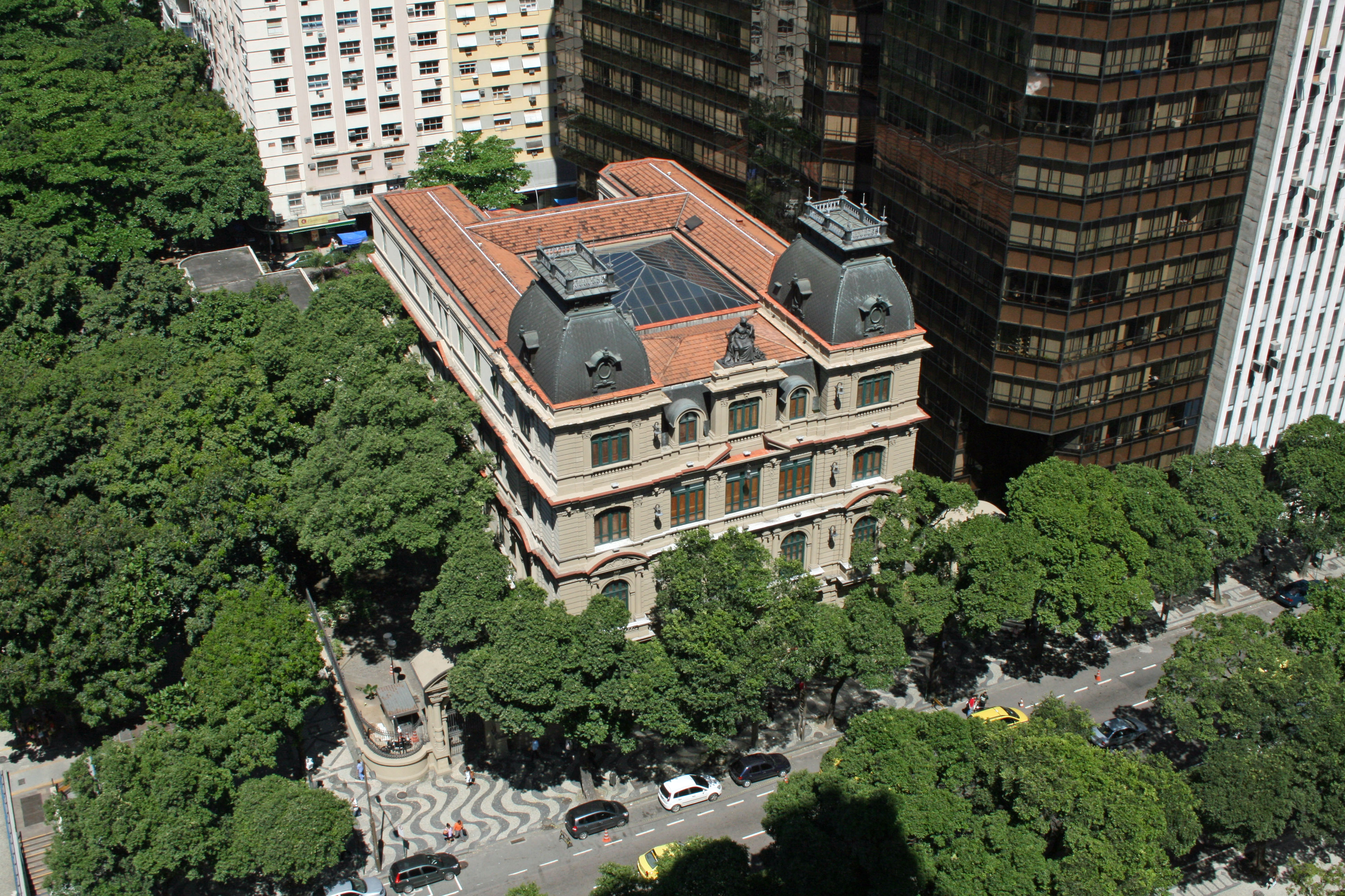 Centro Cultural Justiça Federal, prédio da antiga sede do Supremo Tribunal Federal.